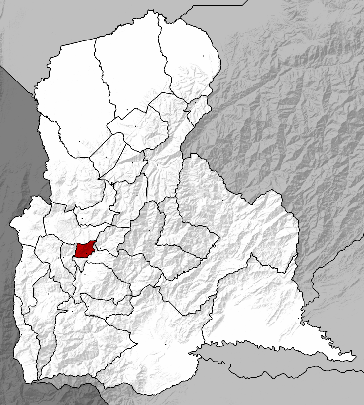 Municipio Guásimos - Táchira